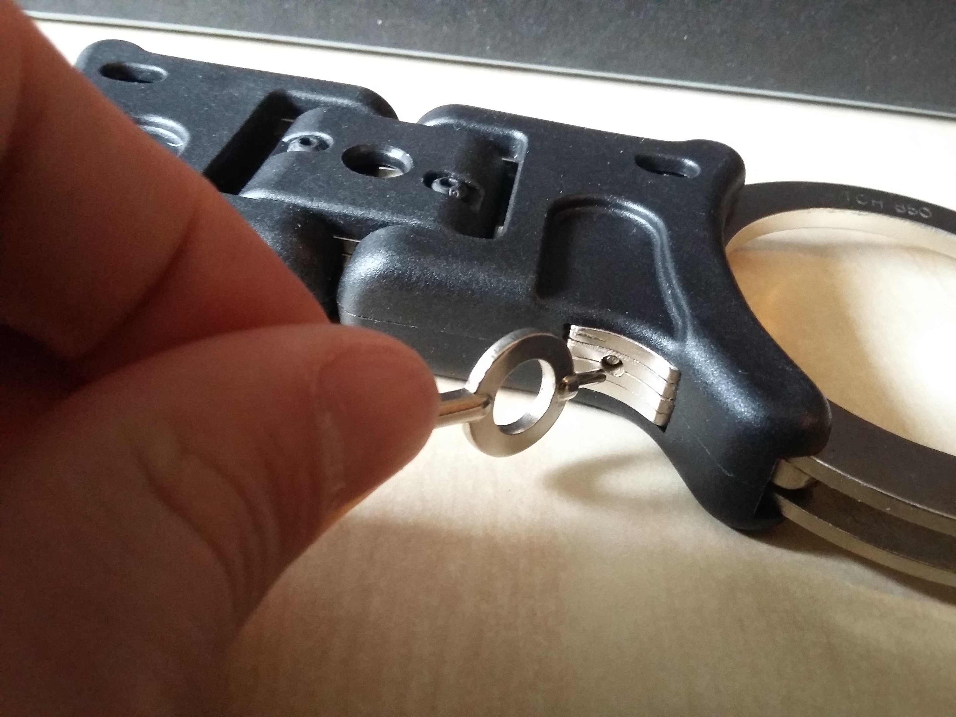 Ključavnica z zatičem dvojnega zaklepanja lisic proizvajalca TCH UK